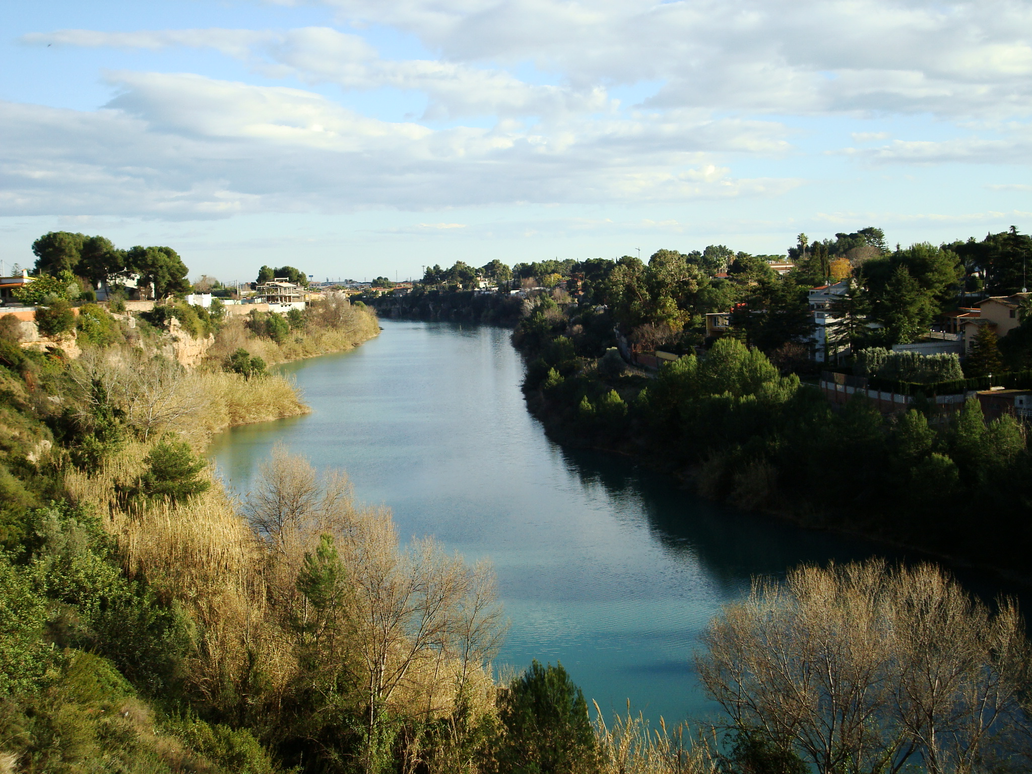 El río Mijares en su paso por Vila-real (Castellón)